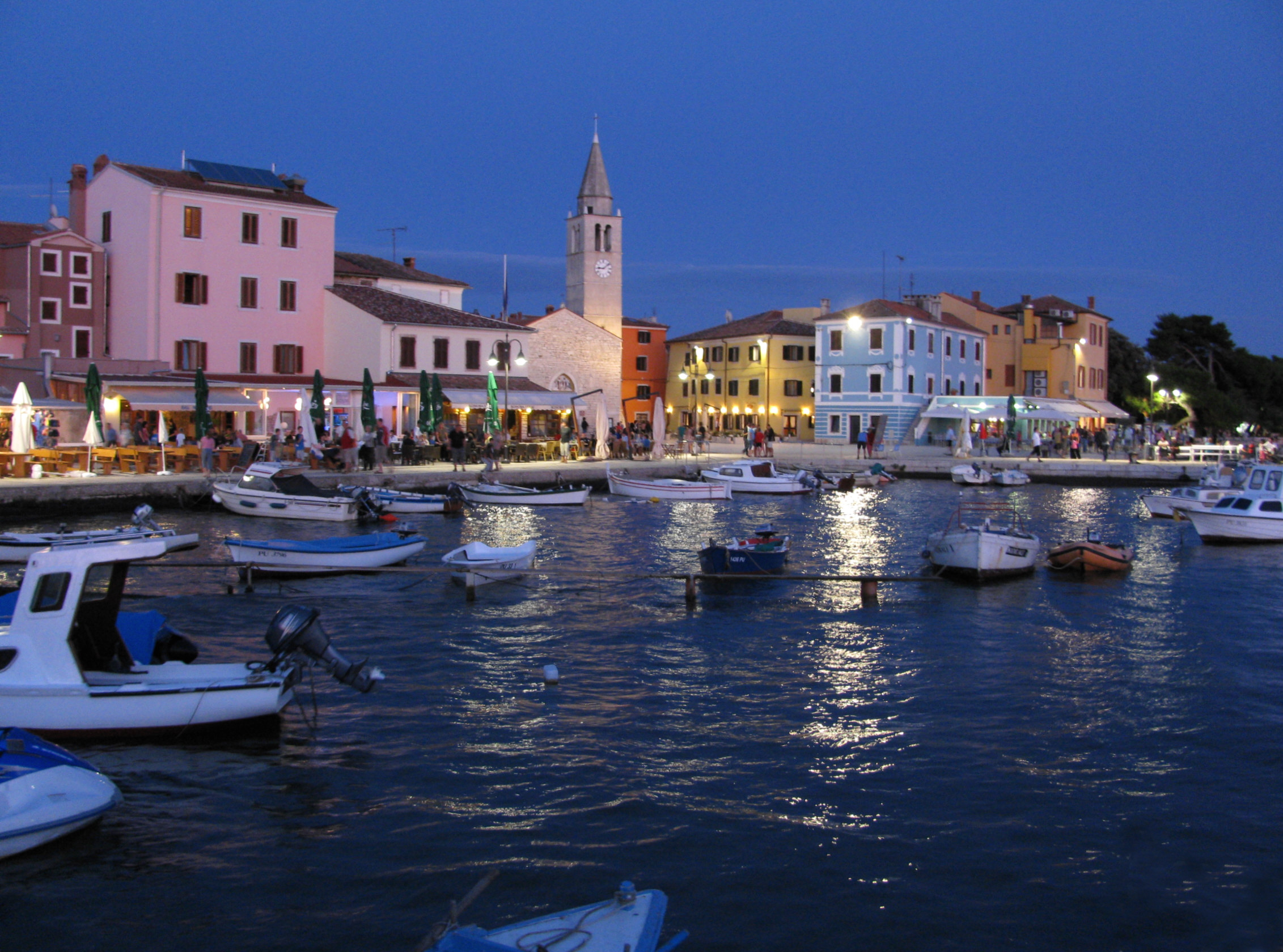 Hafen von Fažana